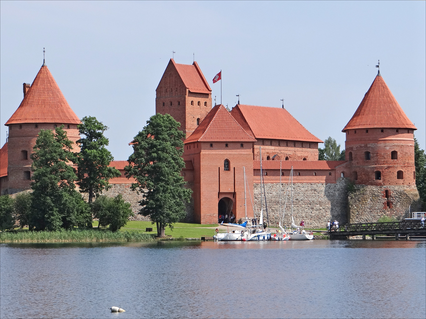 A une trentaine de kilomètres de Vilnius se trouve une zone de lacs aux bords desquels le Grand-Duc Kestutis , fils de Gediminas (voir le premier château de Gediminas à Vilnius), puis son propre fils Vytautas le Grand ont construit des bâtiments fortifiés pour créer un système défensif contre les chevaliers Teutoniques. Les lituaniens étaient alliés aux polonais contre les chevaliers envahisseurs. Il reste de cette période importante de l'histoire du pays, le château actuel construit à la fin du 14ème siècle sur une presqu'île au bord du lac Galvé et qui a été très restauré pour en faire un parc national historique, emblématique de l'identité de la Lituanie. Le site est un lieu de loisirs et la principale attraction touristique de la région de Vilnius. Trakai est aussi connue pour sa petite communauté de Juifs karaïtes, qui y sont installés depuis que le grand-duc Vytautas le Grand les a engagés pour la garde de la forteresse au début du XVe siècle. Extrait de l'article de Wikipedia sur Trakai